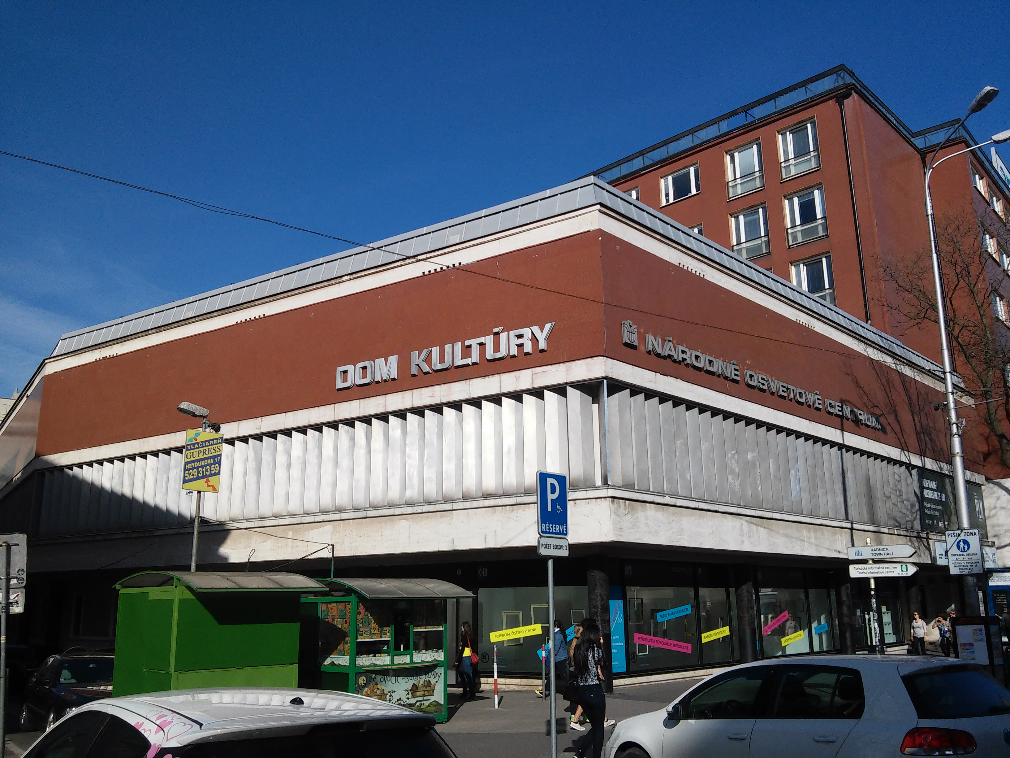 Kunsthalle Bratislava